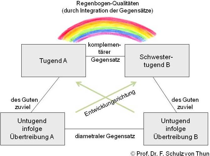 Schaubild des Werte- und Entwicklungsquadrates nach Prof. Friedemann Schulz von Thun